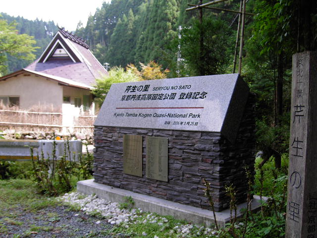 芹生の里に建立された京都丹波高原国定公園登録記念碑